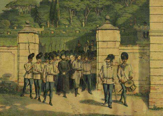 "Ugo Bassi condotto al patibolo", ridotto e ritoccato, litografia